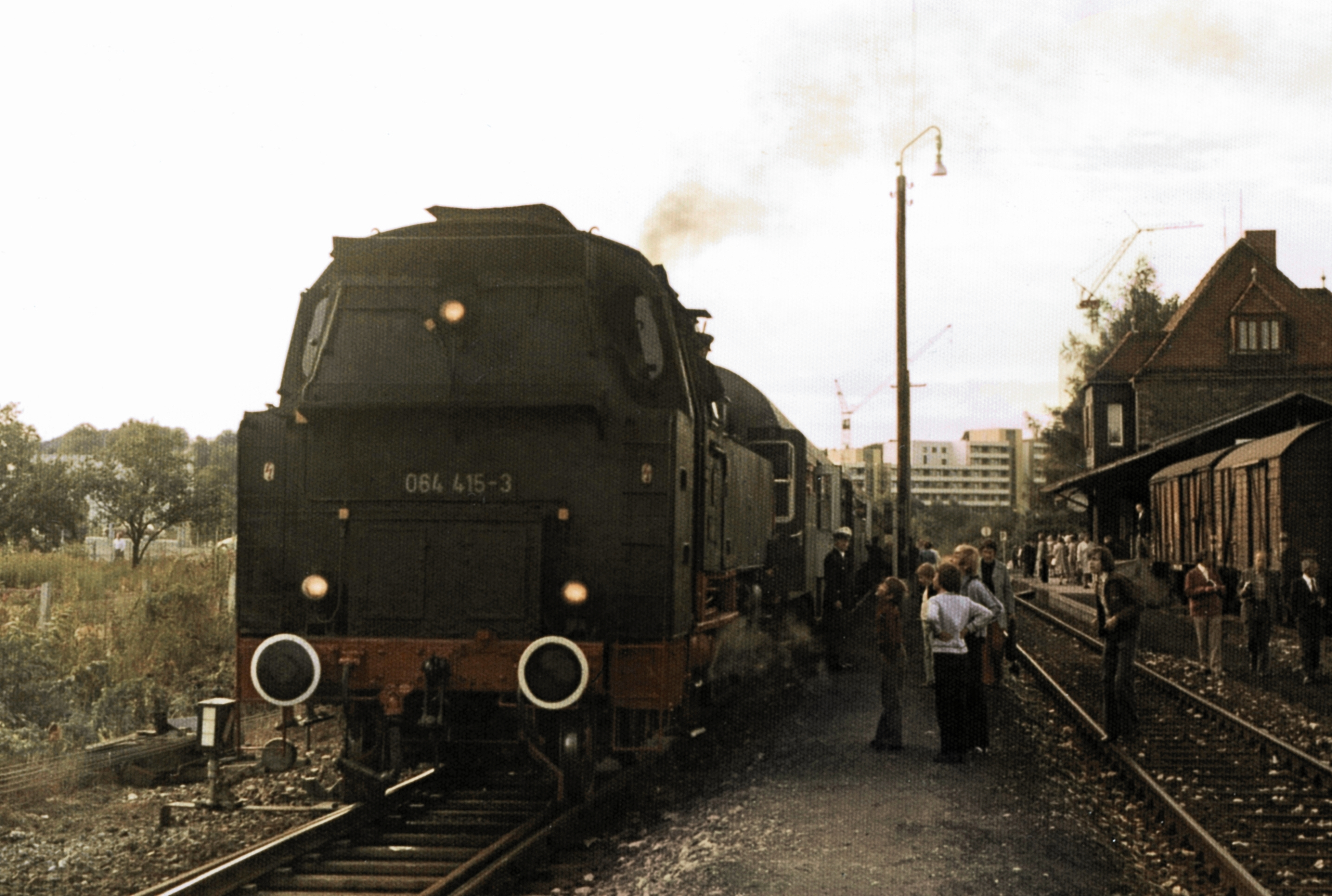 Letzter Personenzug Bayreuth Altstadt (Scan von Dia)